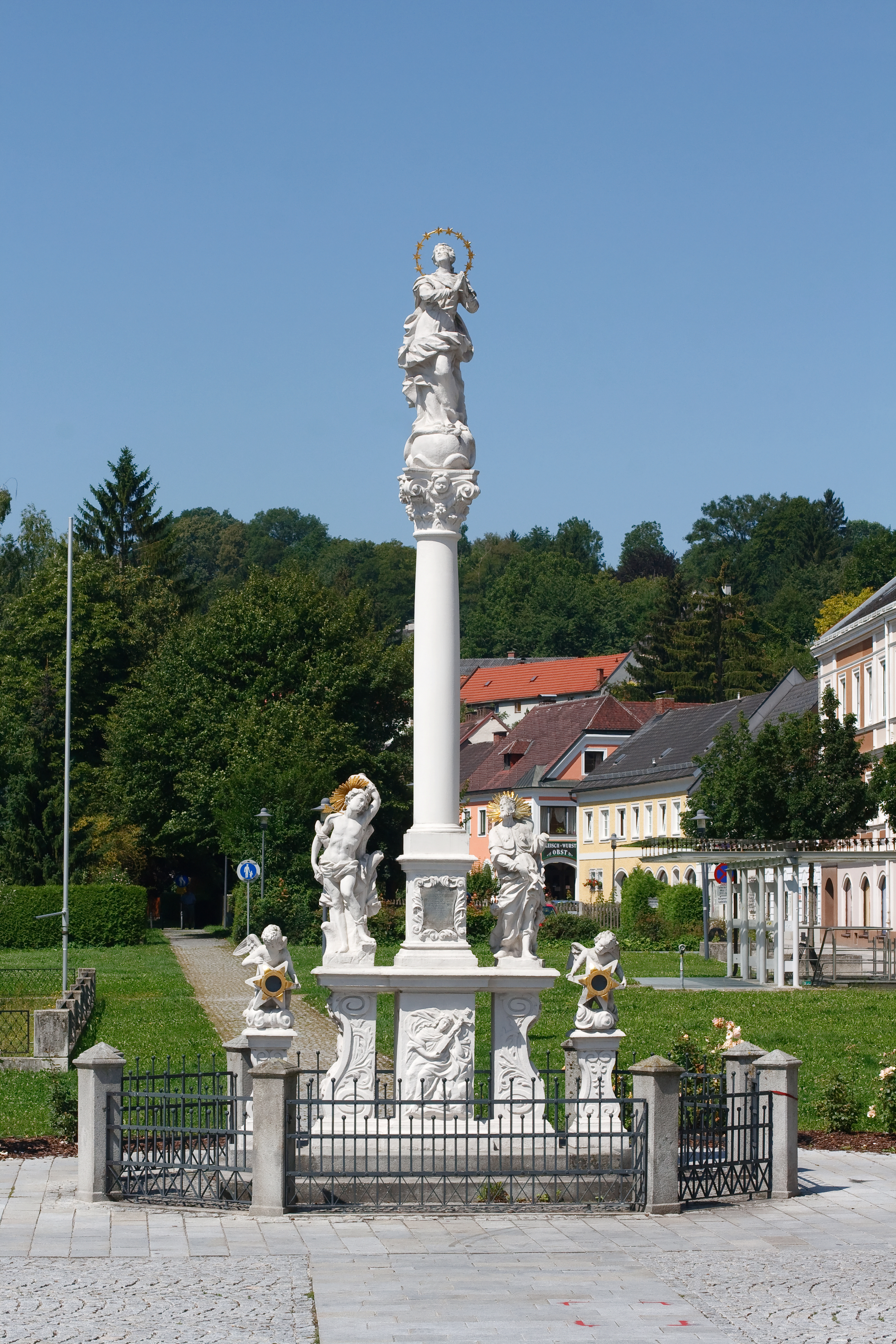 Mariensäule am Steyrer Wieserfeldplatz